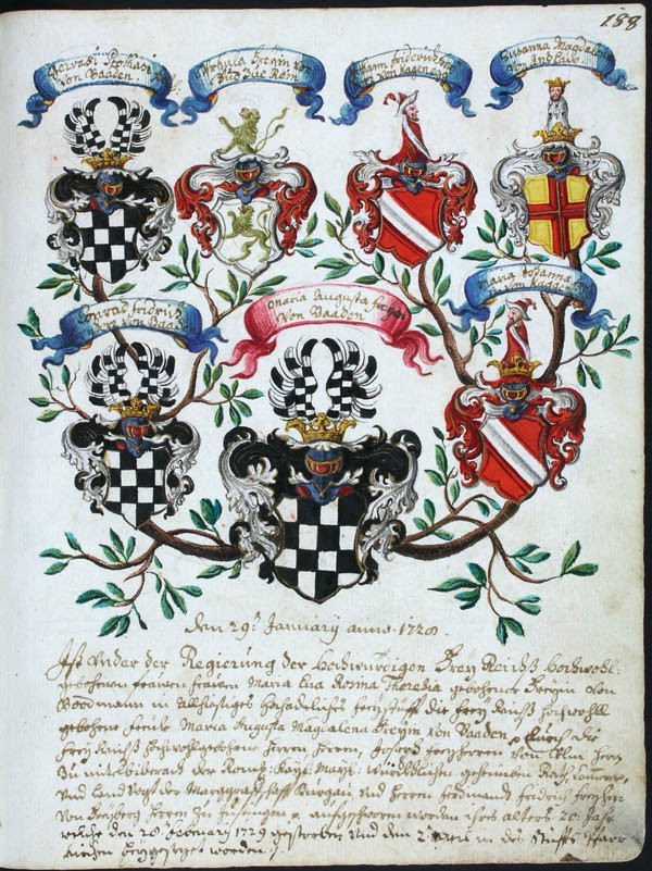 Adelsprobe der Maria Augusta von Baaden (gest. 1729). Aus dem Aufschwörbuch des Damenstifts St. Stephan in Augsburg (Staatsarchiv Augsburg, Damenstift Augsburg-St. Stephan MüB 77 1/2)